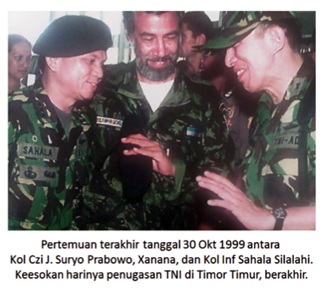 Discusi Antar Sahabat